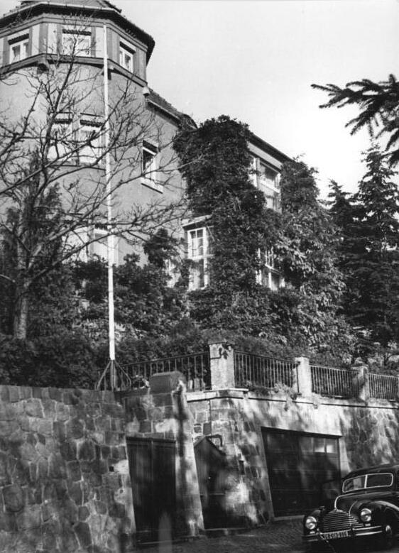 Dresden, Radebeul, Andersen-Nexös Heim Illus Junge 13.12.1951 Andersen-Nexös Heim. Andersen-Nexös Heim in Dresden Radebeul.